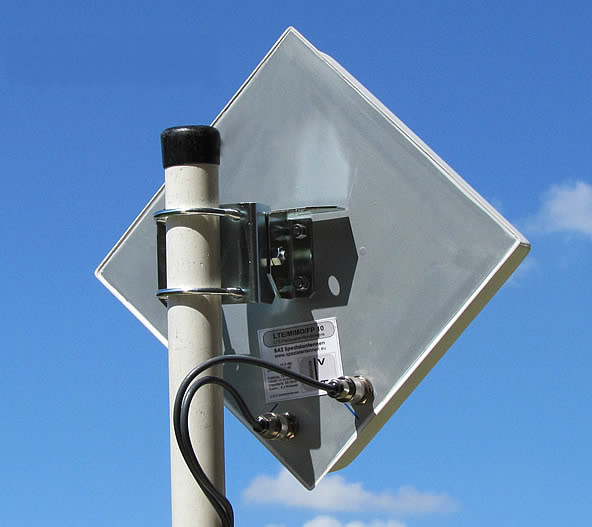 Antenne für LTE MIMO Technologie mit 2 Anschlüssen von versetzten Innen-Antennen (Nutzung der Antennendiversität)